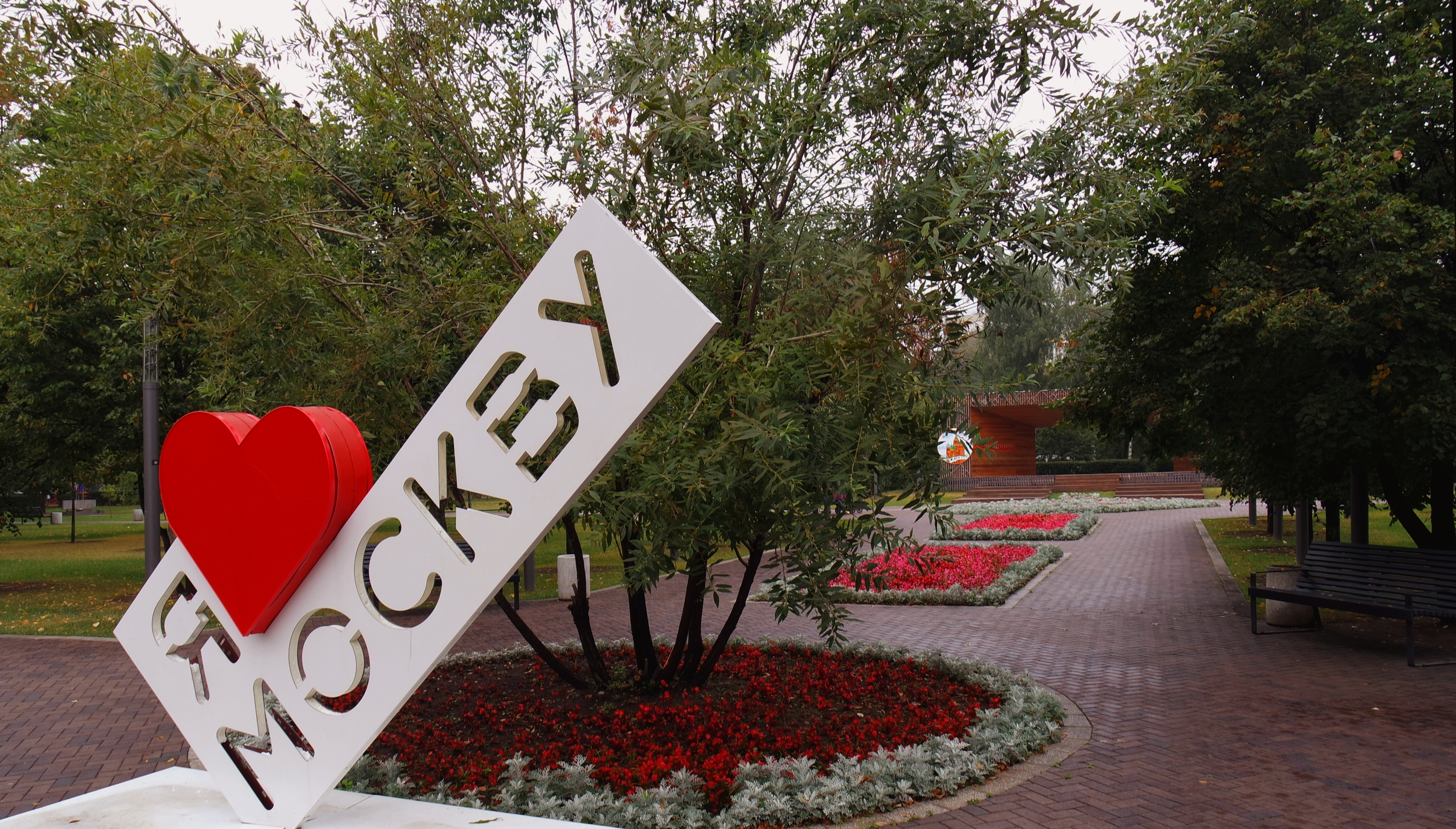 Парк на ул. Руставели (Гончаровский парк): Бутырский, Северо-Восточный округ, Москва